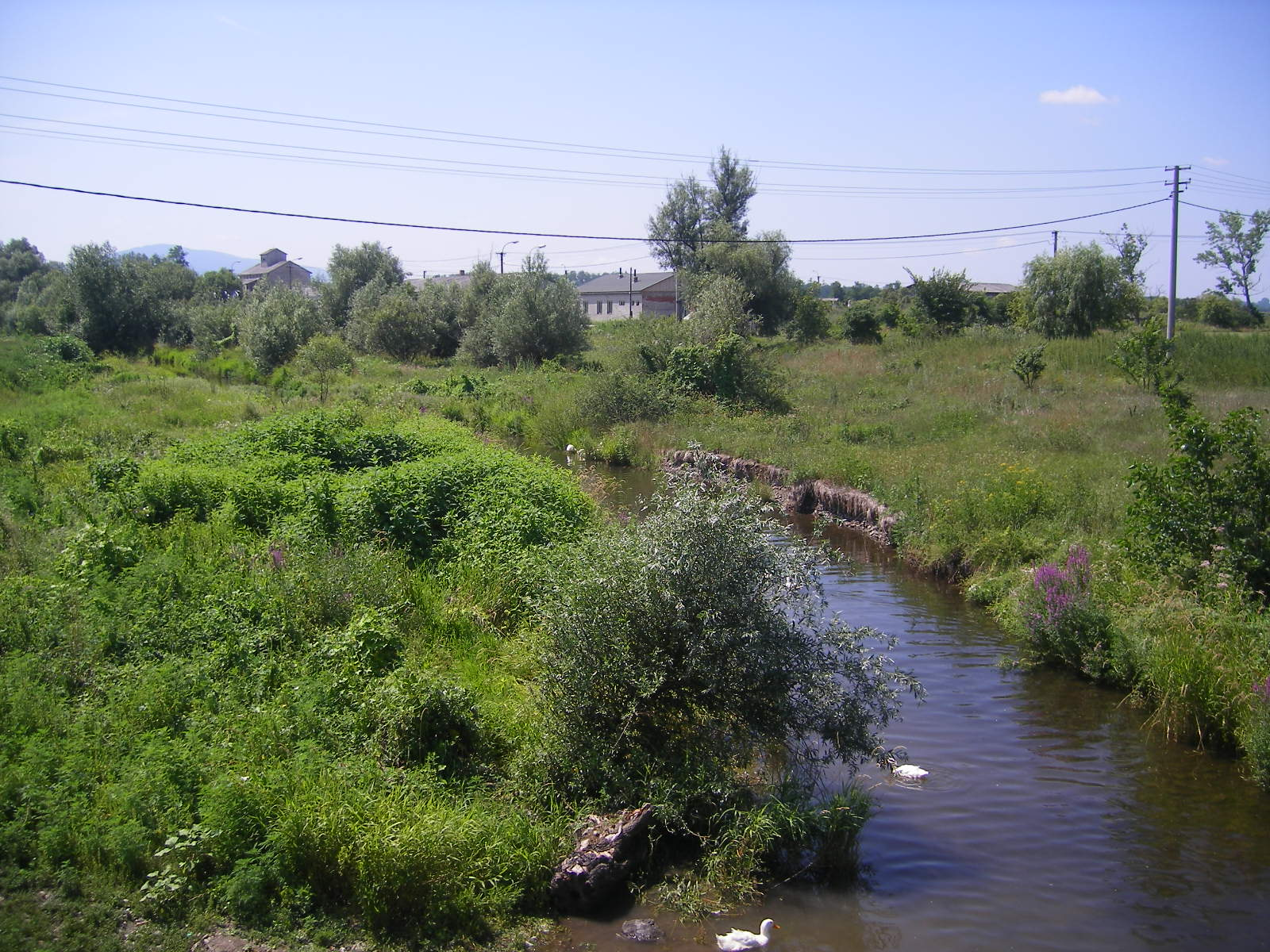 Ipolyság/Pereszlény - a Bernecei-patak